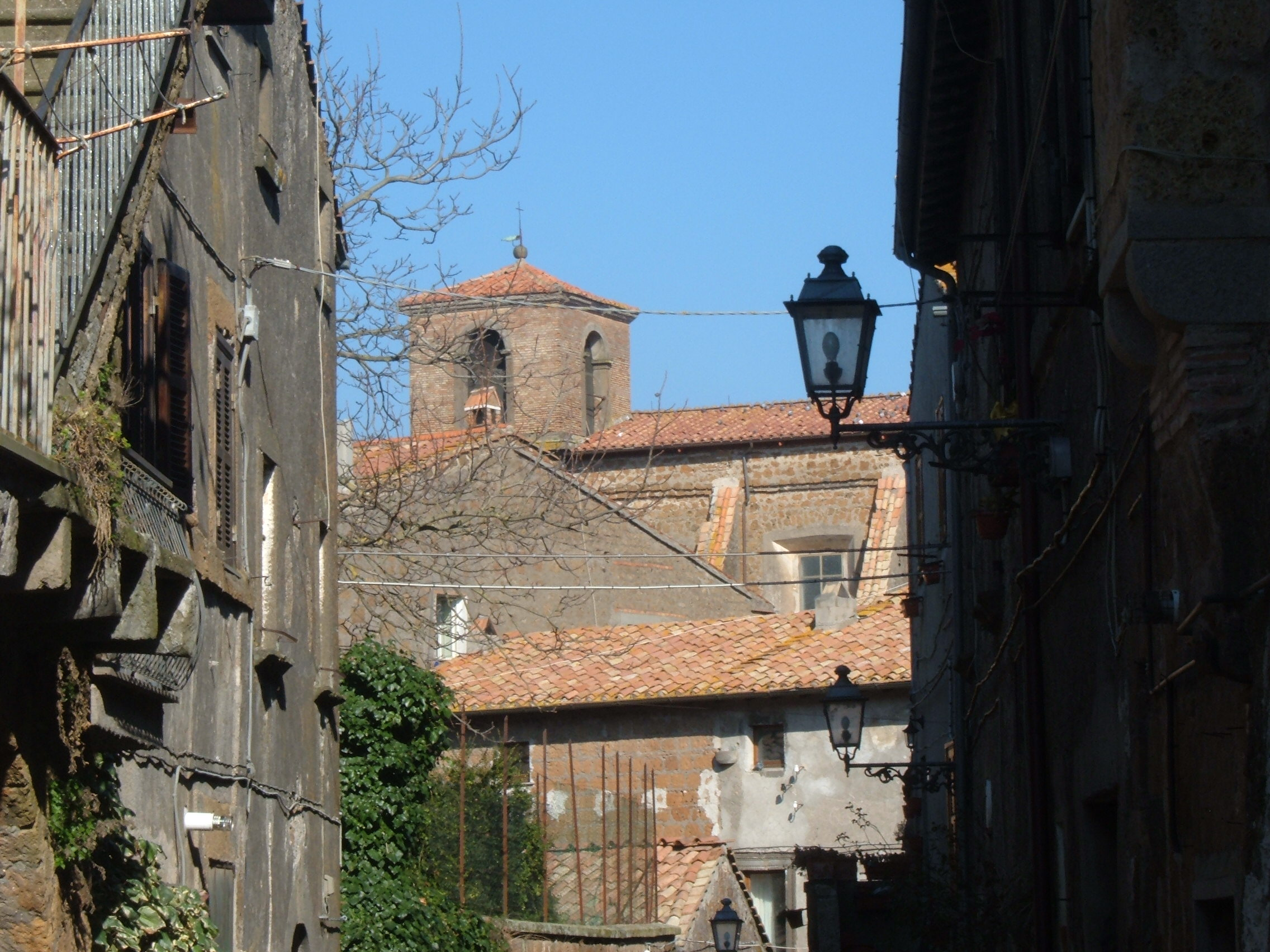 Collegiata di Santa Maria Assunta (Barbarano Romano).